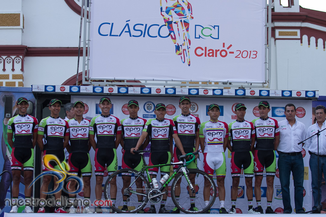 Presentación Clásico RCN 2013 Jueves 26 de septiembre de 2013 Florencia, Caquetá